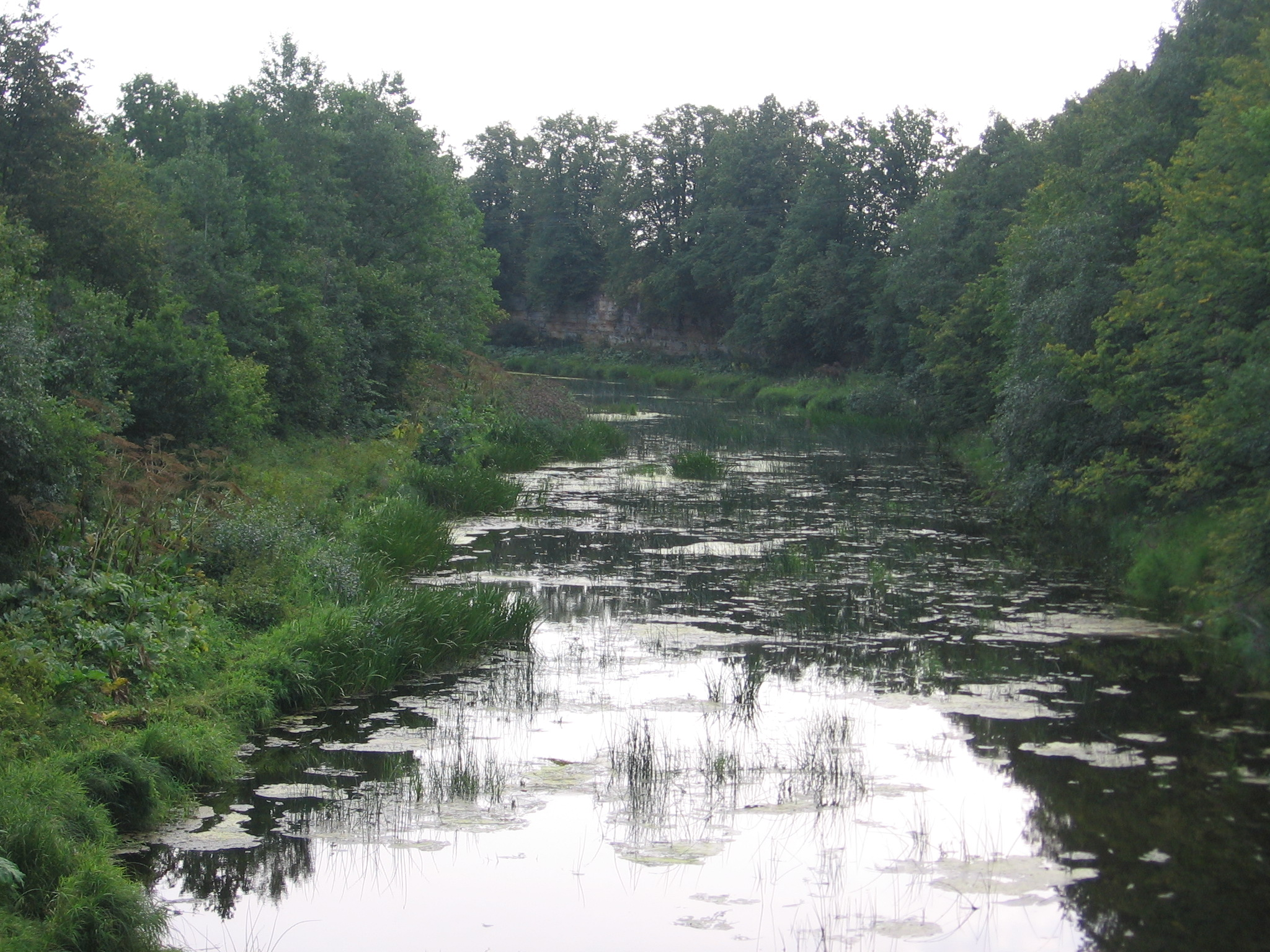 река Кухва